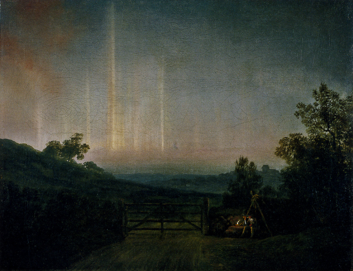 Landschaft mit Nordlicht (Versuch die Aurora Borealis zu malen)